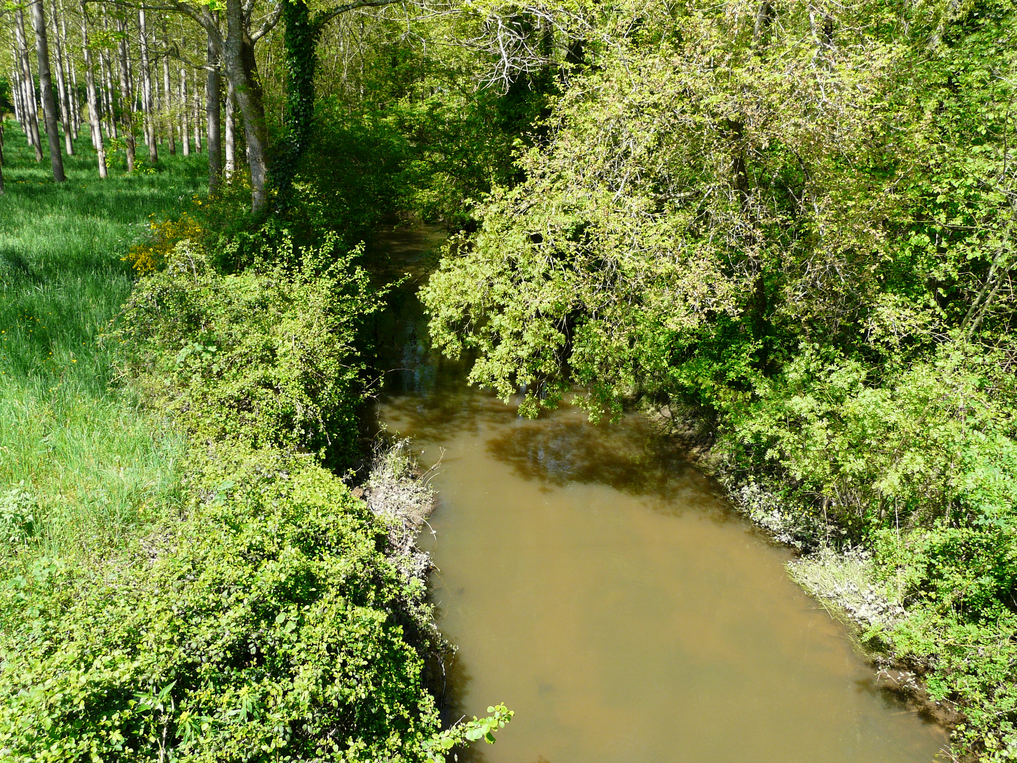 La Rizonne en aval du pont de la route départementale 708, en limite de Vanxains et La Jemaye, Dordogne, France